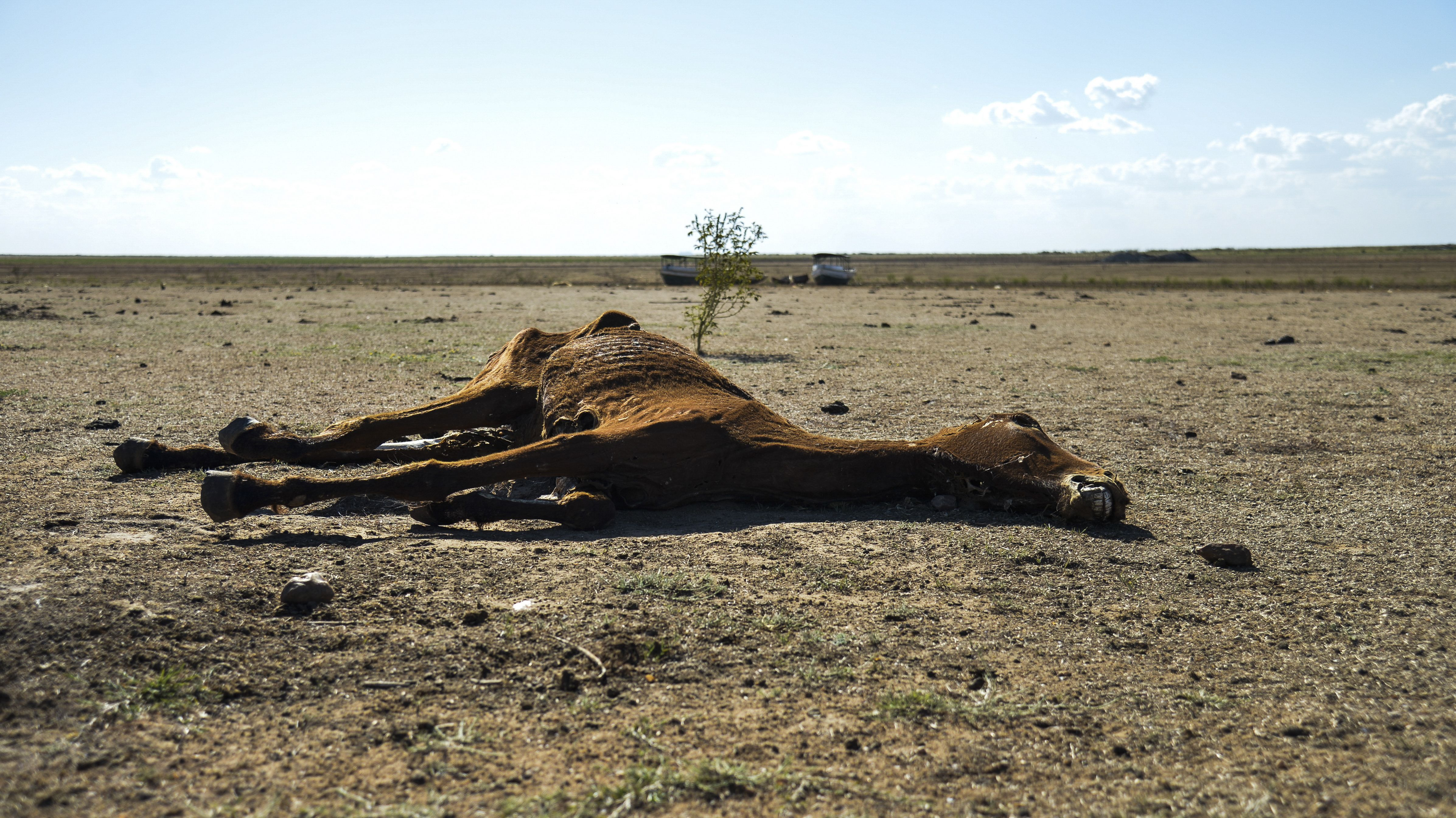 Remanso (BA) - Com a falta de chuva na nascente do Rio São Francisco, o reservatório de Sobradinho vive a maior seca de sua história.